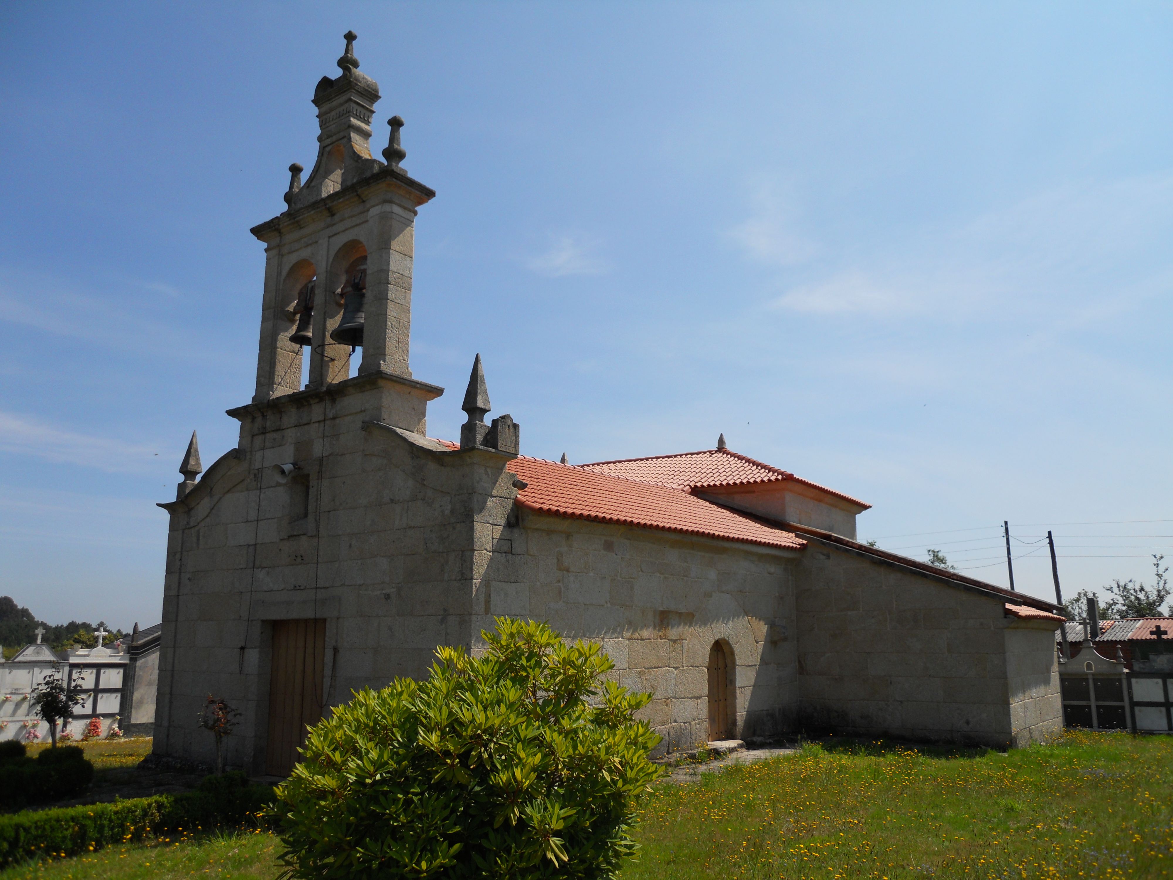 Iglesia de origen románico, profundamente reformada en época posterior. Conserva en su interior el arco triunfal apoyado sobre capiteles de la construcción original.